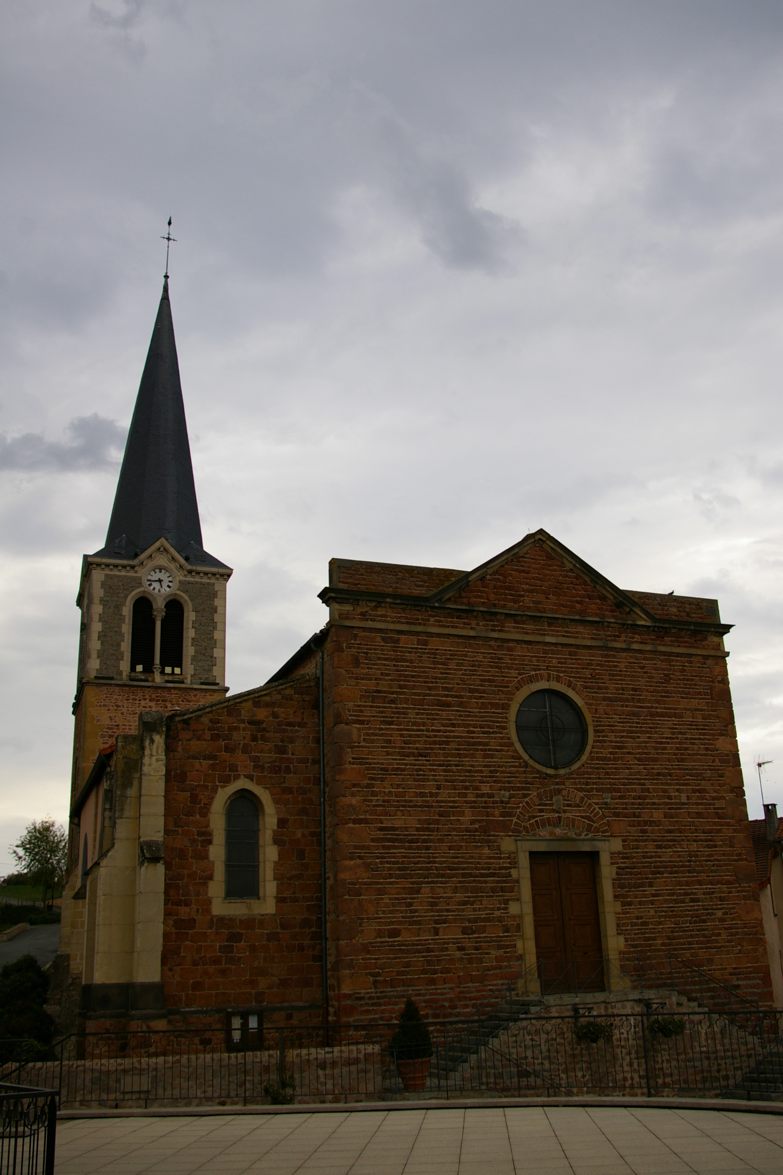 Église Saint-Bonnet de Perreux, (Inscrit, 1949) .